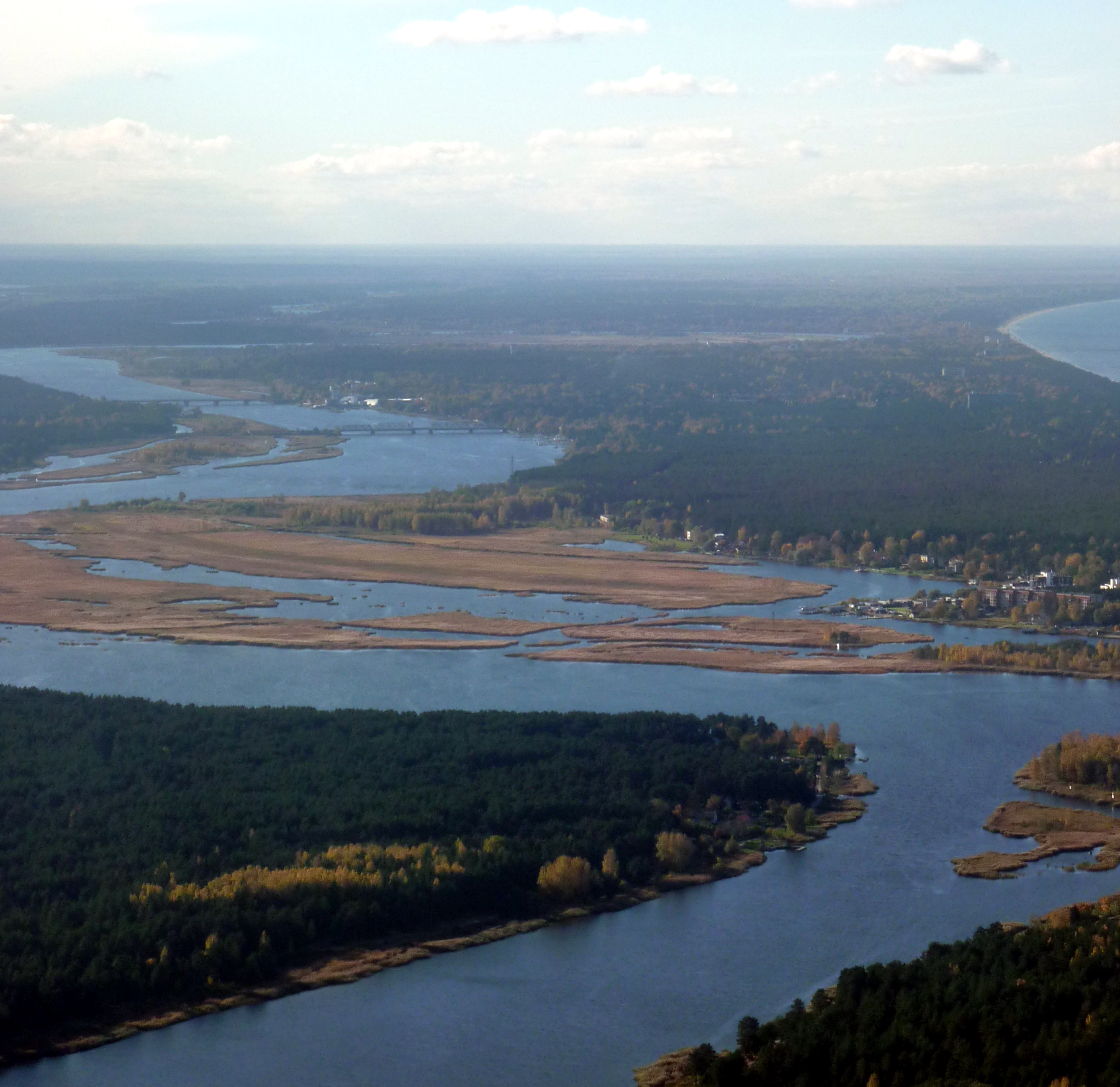 Lelupa z lotu ptaka